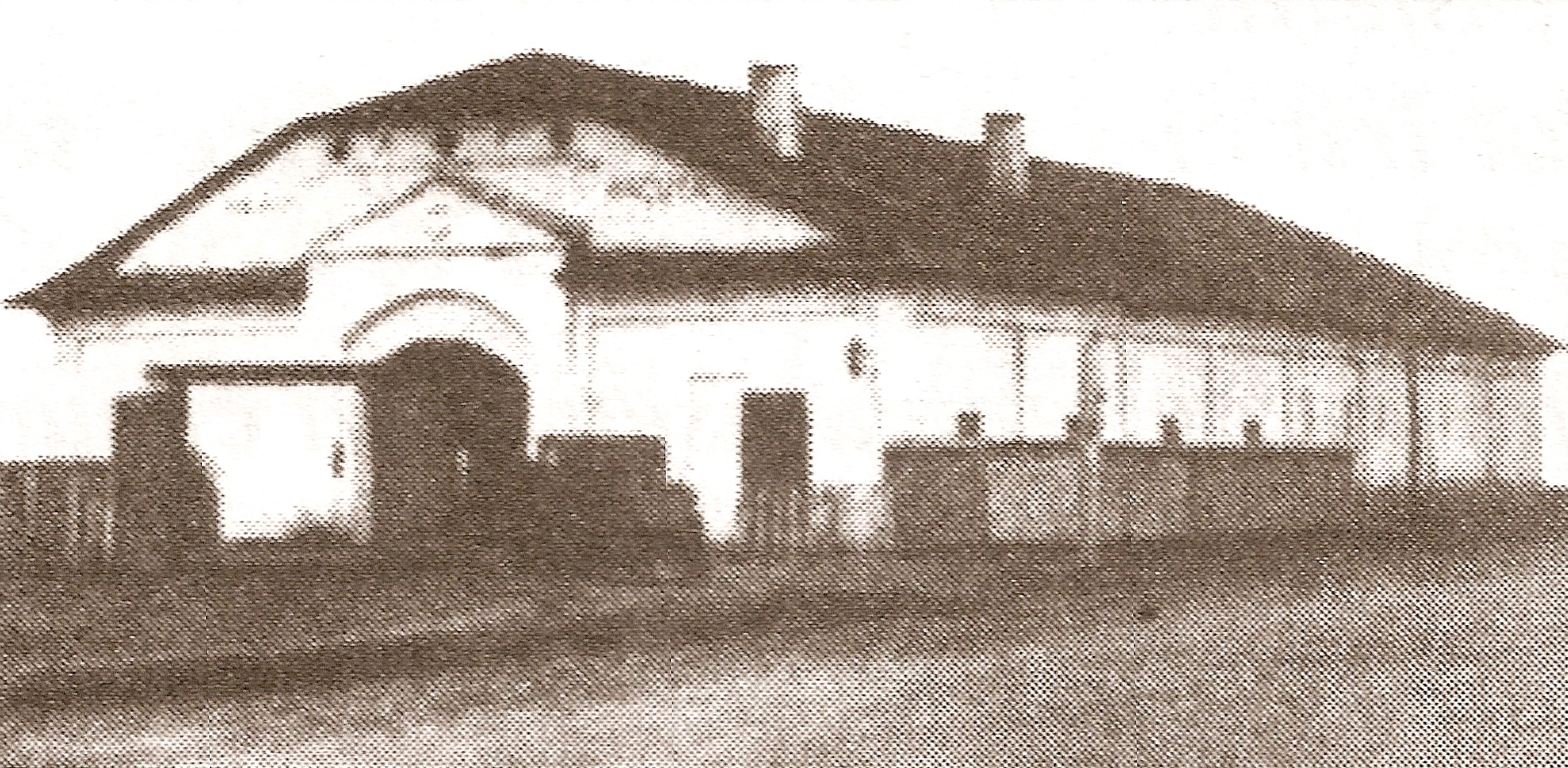 Hanu' Ancuţei, clădirea originală ce a fost dărâmată în 1967, şi care reprezintă locul de desfăşurare al acţiunii pentru nuvela Hanu-Ancuţei a lui Mihail Sadoveanu.